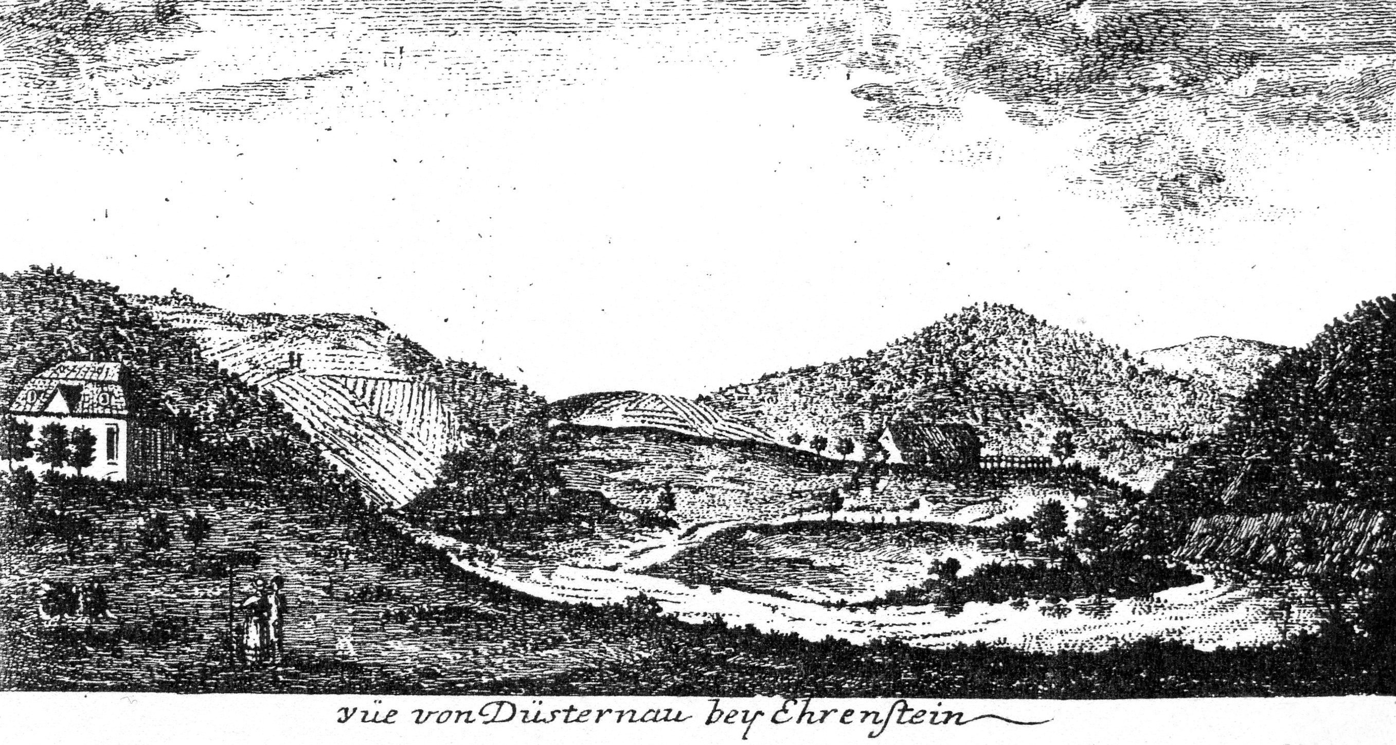 Vüe von Düsternau bey Ehrenstein. Kupferstich 8,3 x 16,6 cm von P.W. Schwarz, abgebildet auf dem Umschlag Mahlerische Reise am Nieder-Rhein, Heft II/ Köln 1785.